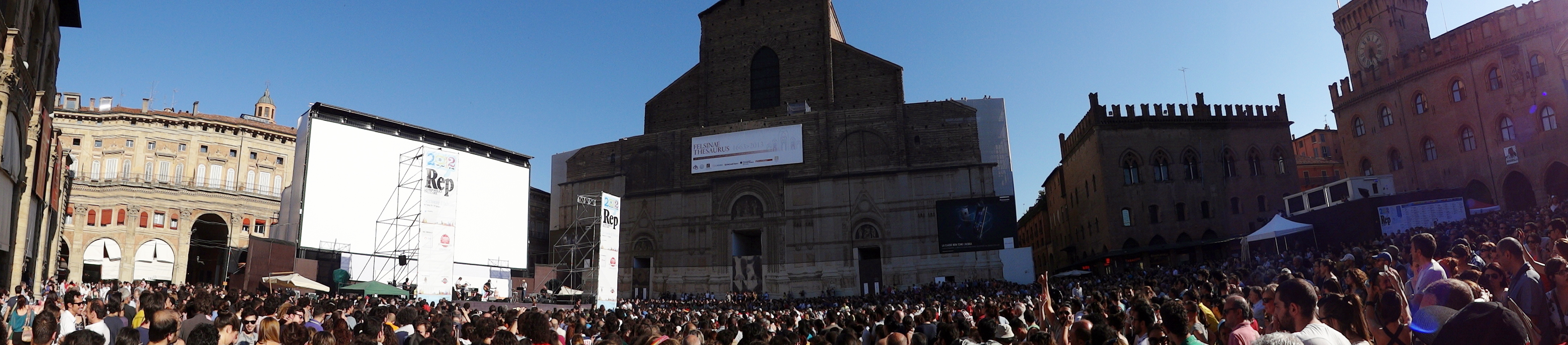 Francesco De Gregori a La Repubblica delle idee - Piazza Maggiore, Bologna 17 Giugno 2012